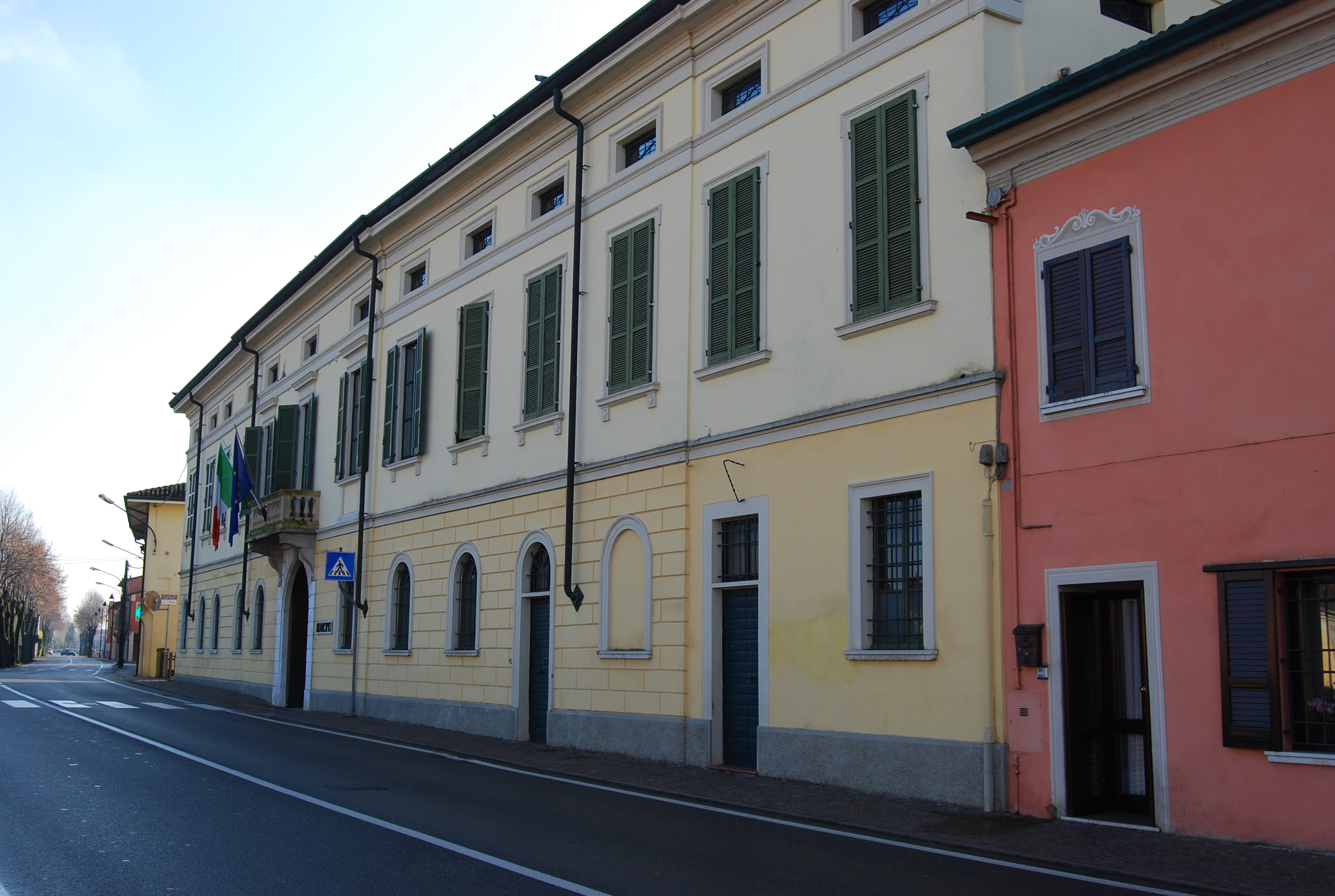 Acquafredda (BS) Via Repubblica e il Municipio.